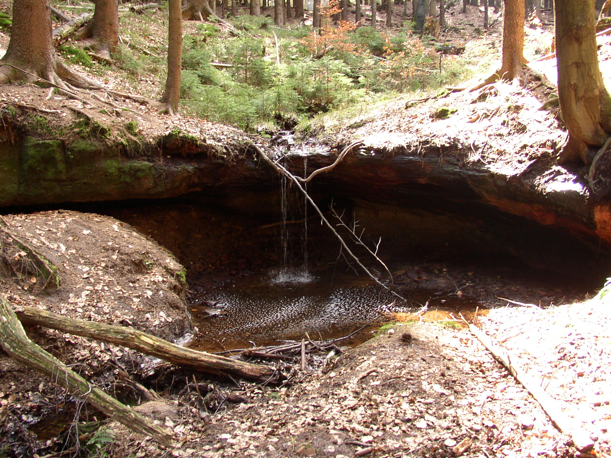 Míšeňský vodopád, Jiřetín pod Jedlovou, okres Děčín, Ústecký kraj, Česká republika